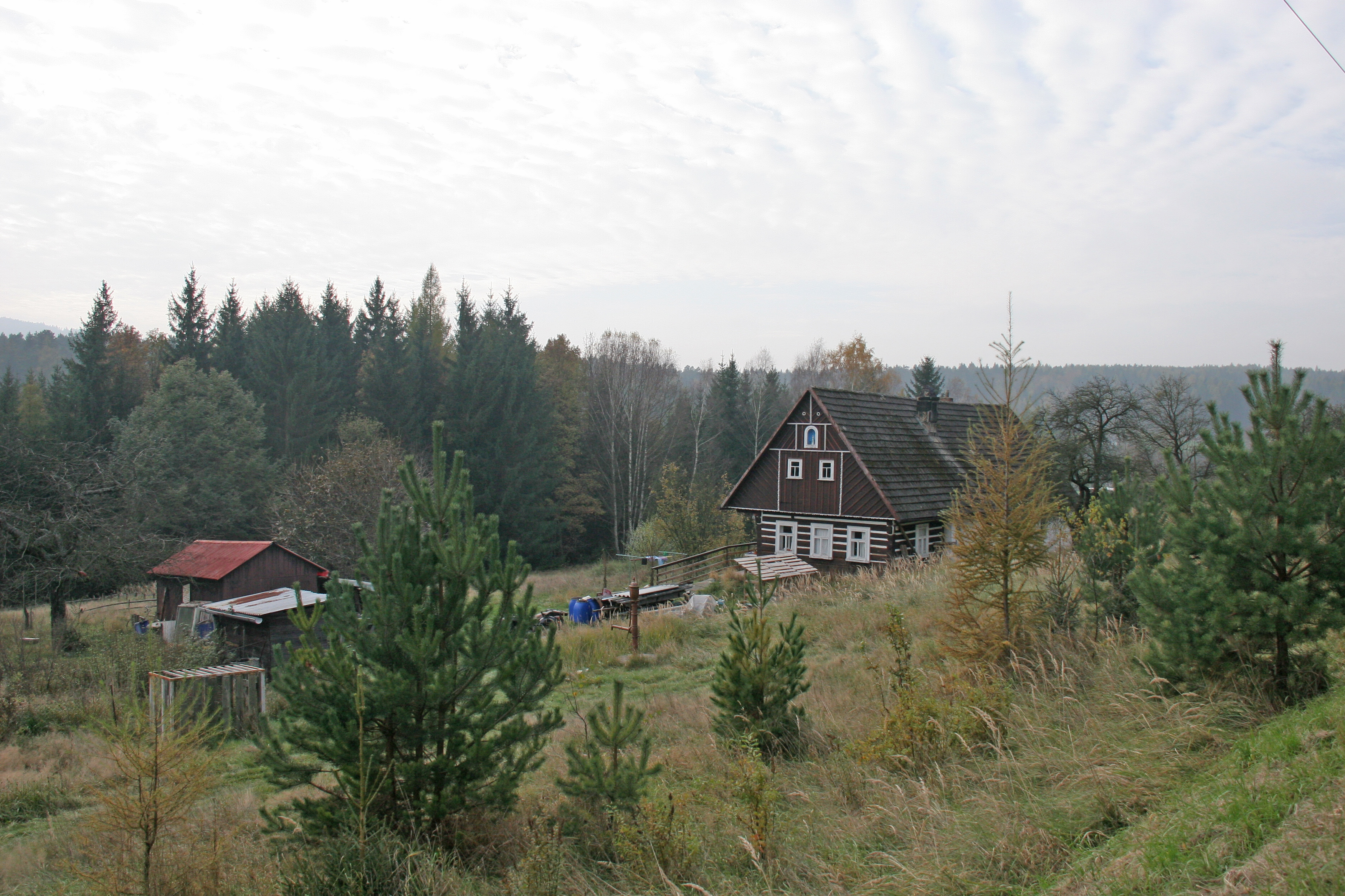 Souvrať 93